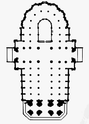 Planta de la Catedral Nueva de Vitoria-Gasteiz